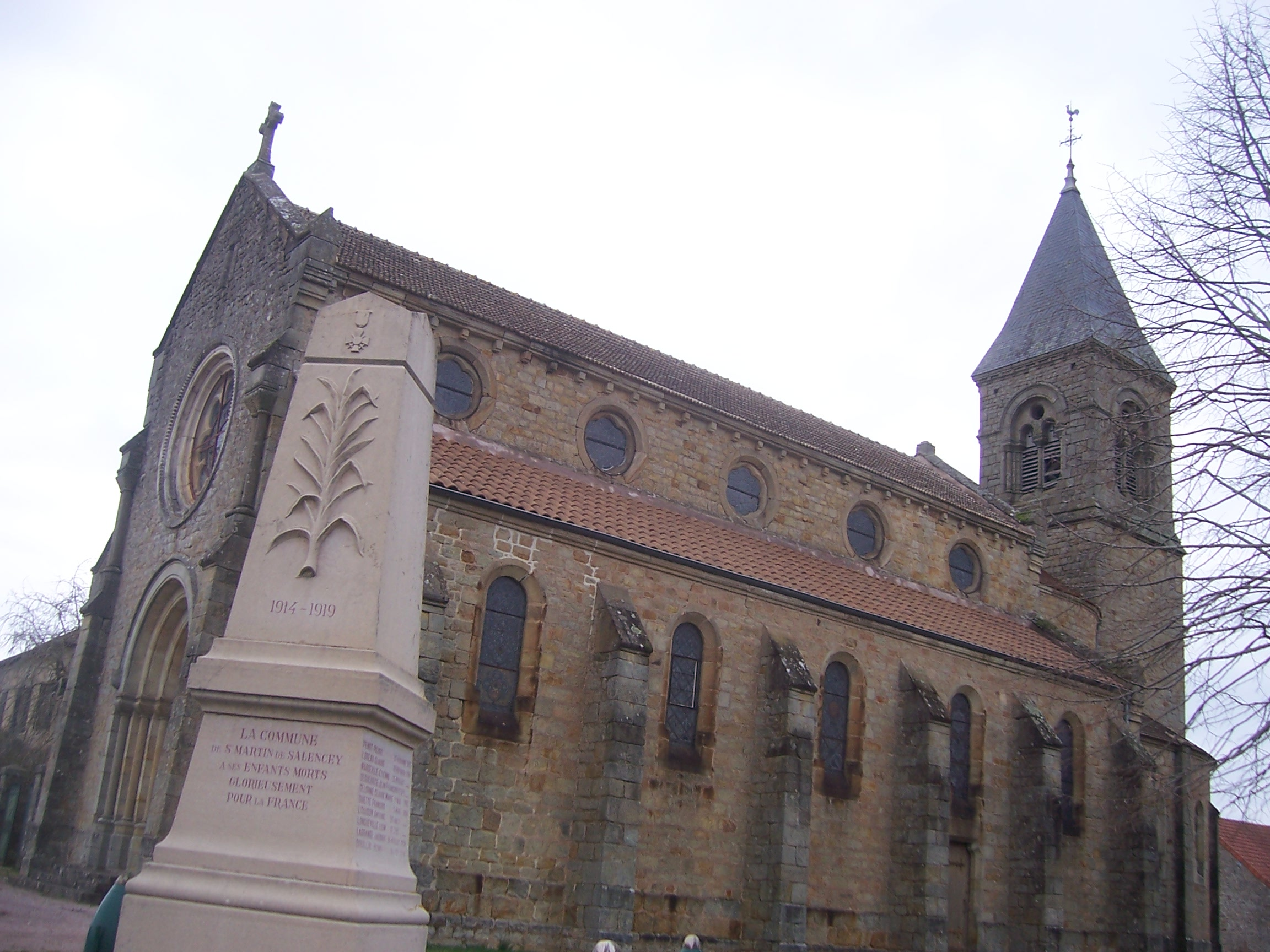 Eglise de Sain-Martin-de-Salencey